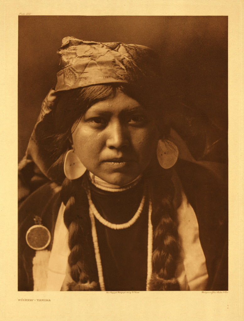 Wishnai, pleme Yakima.